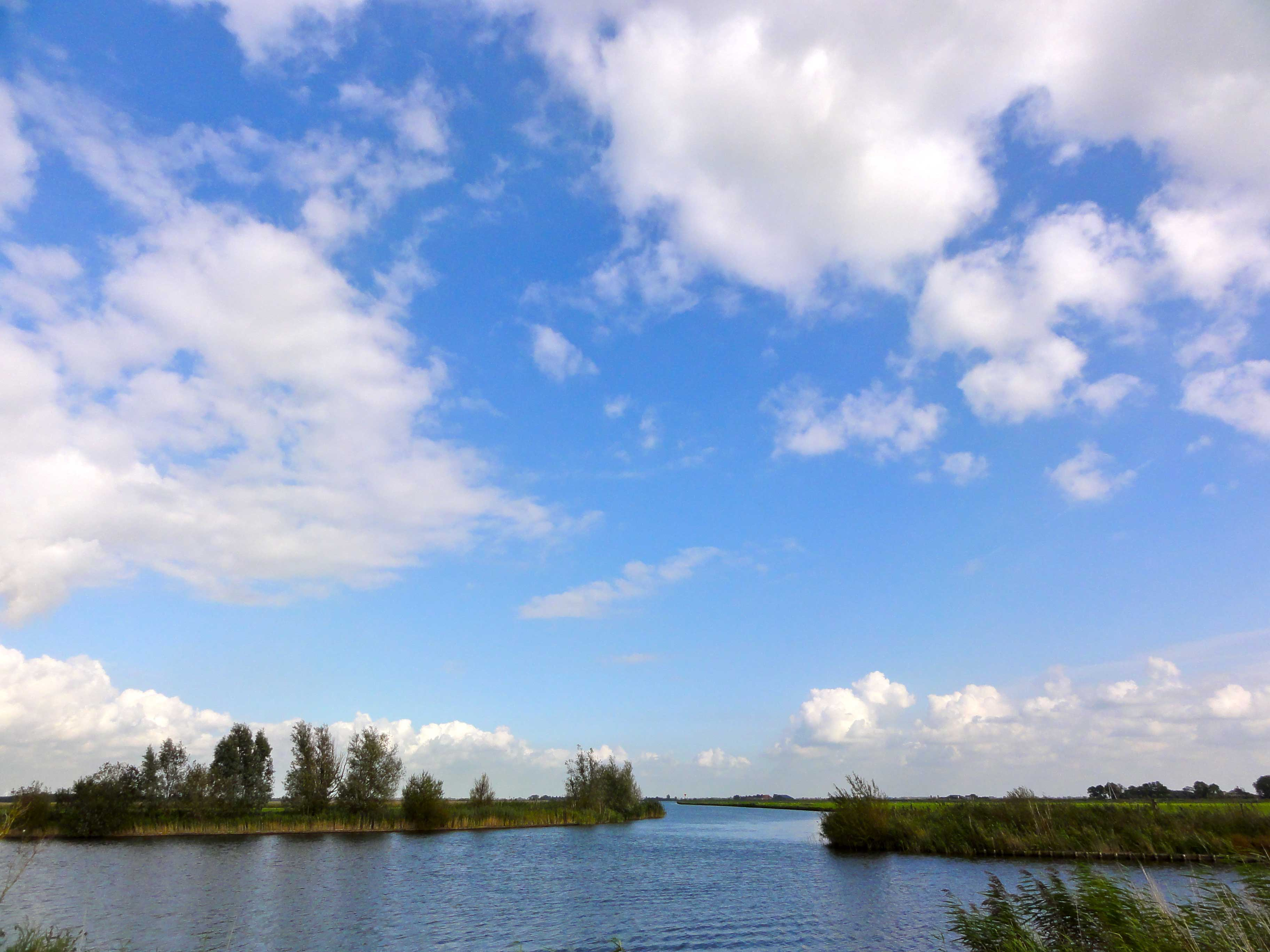 De Ee en de Woudsloot